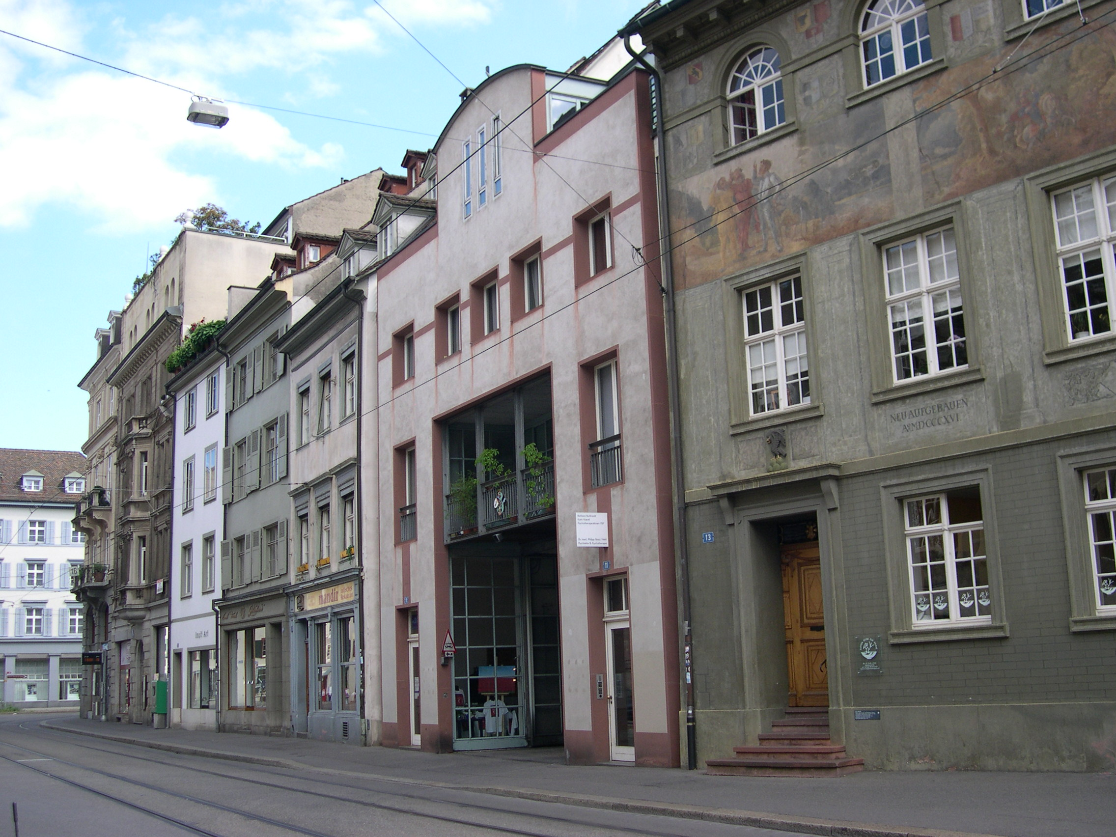 Basel, Toreingang zum Feuerwehrmuseum in der Spalenvorstadt